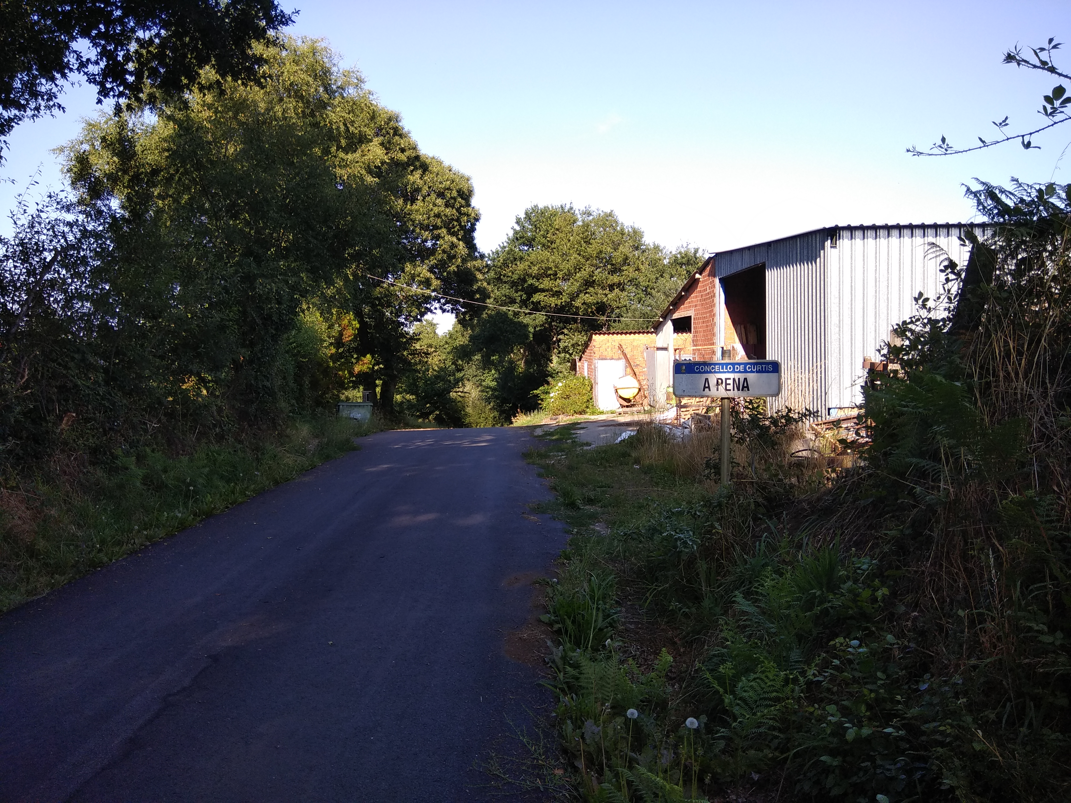 Vista da Pena, Curtis, Galiza.